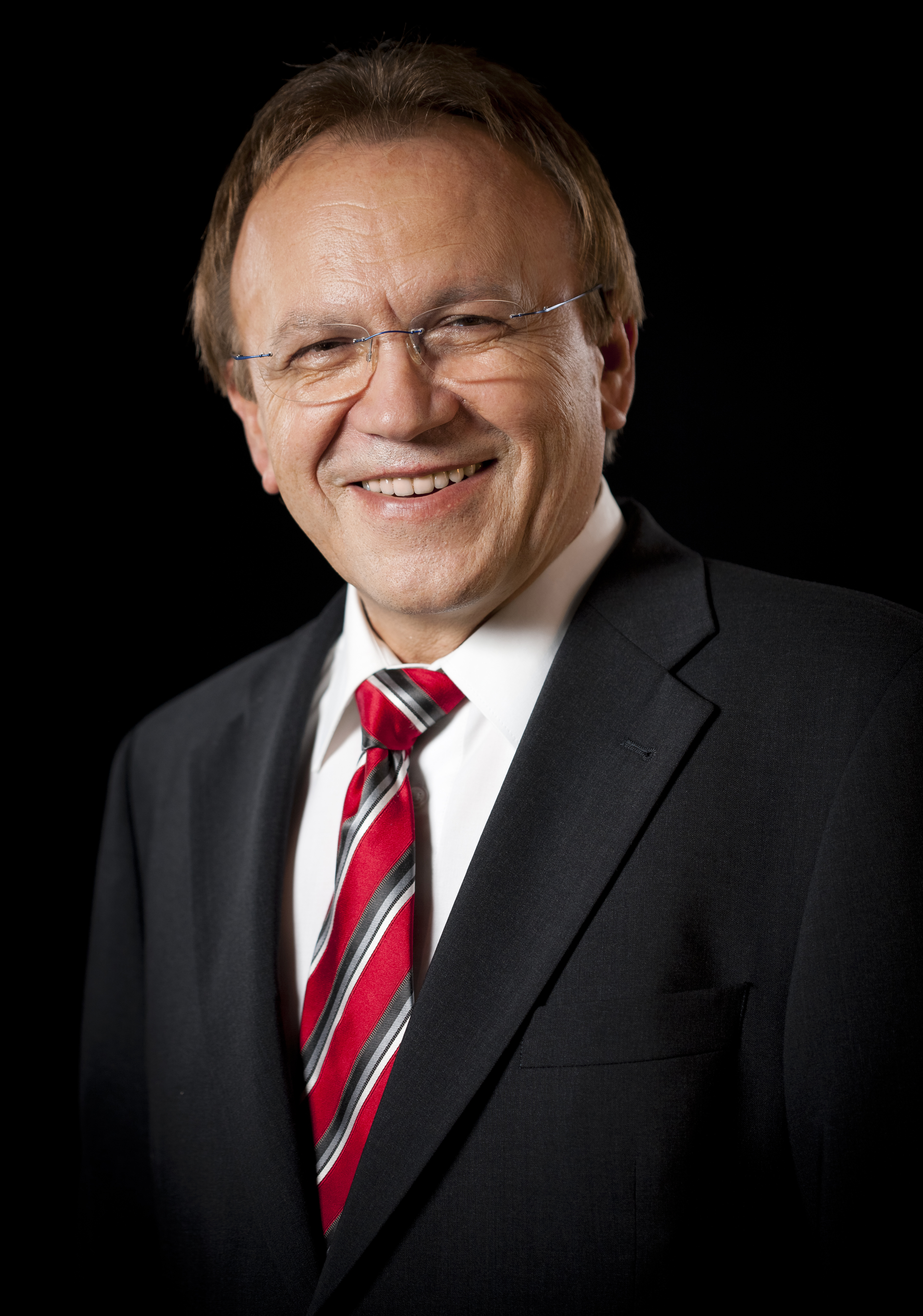 Erich Pipa, Politiker, Landrat, Main-Kinzig-Kreis, Hessen, SPD, Vize-Präsident Hessischer Landkreistag